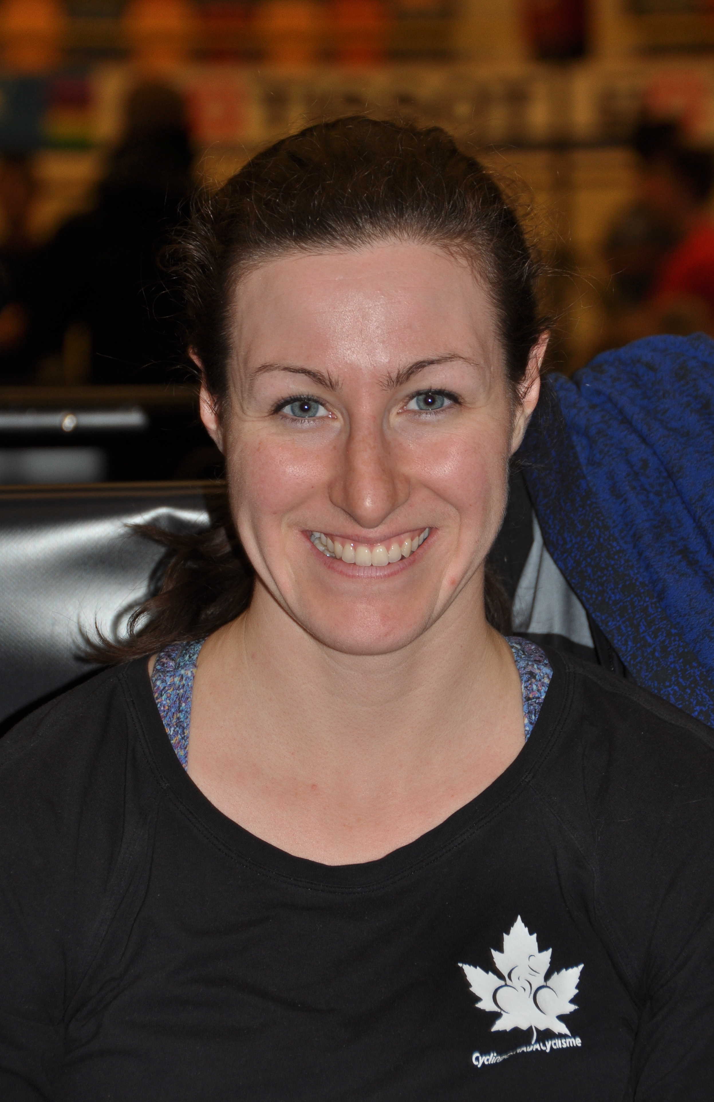 Kinley Gibson, kanadische Radsportlerin